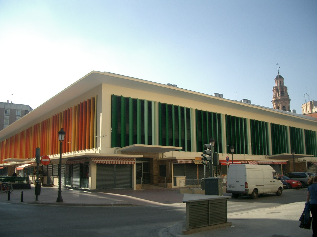 Mercado de Ruzafa, Valencia